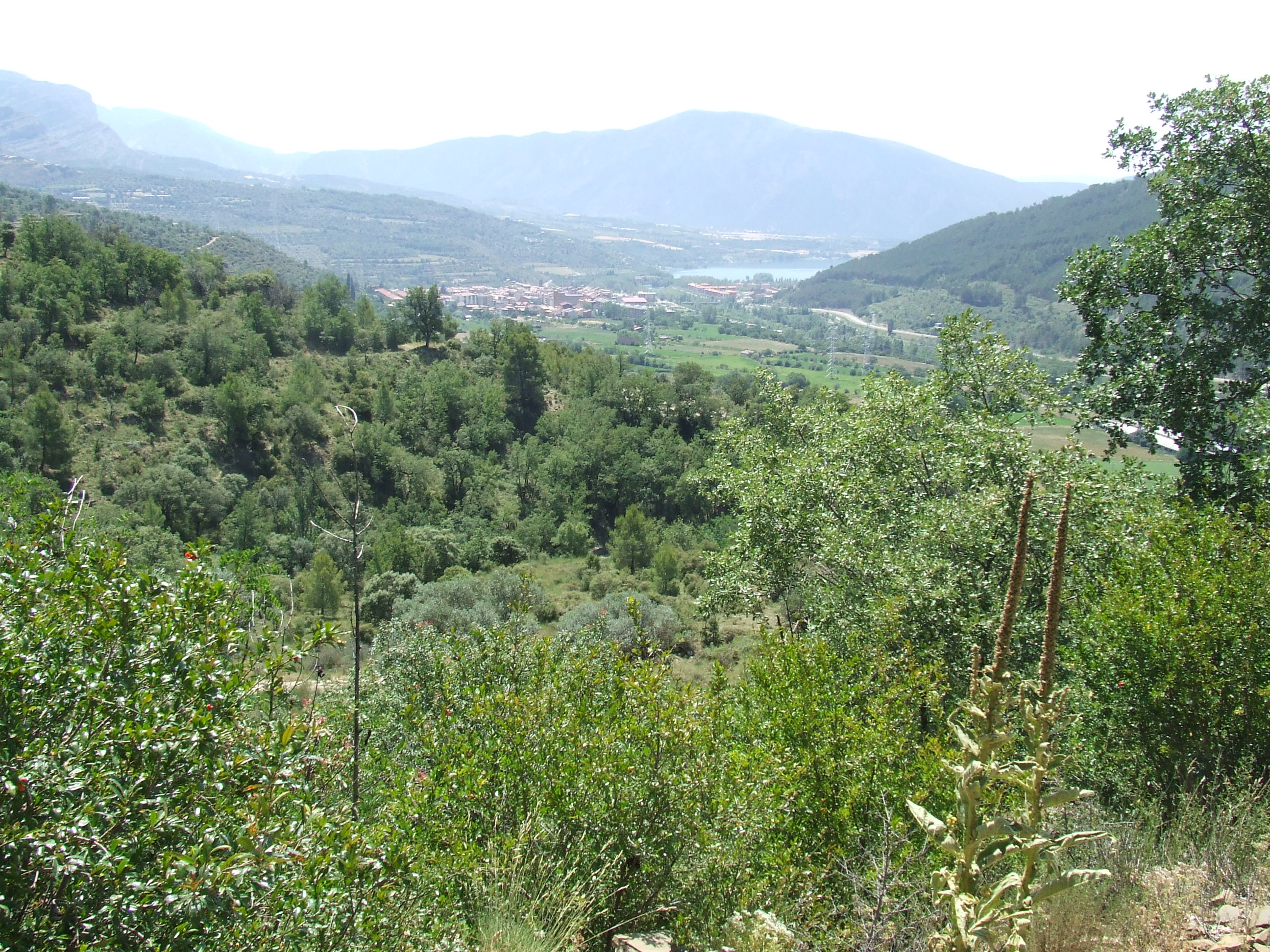 La vall del Flamisell a la Pobla de Segur (Pallars Jussà)